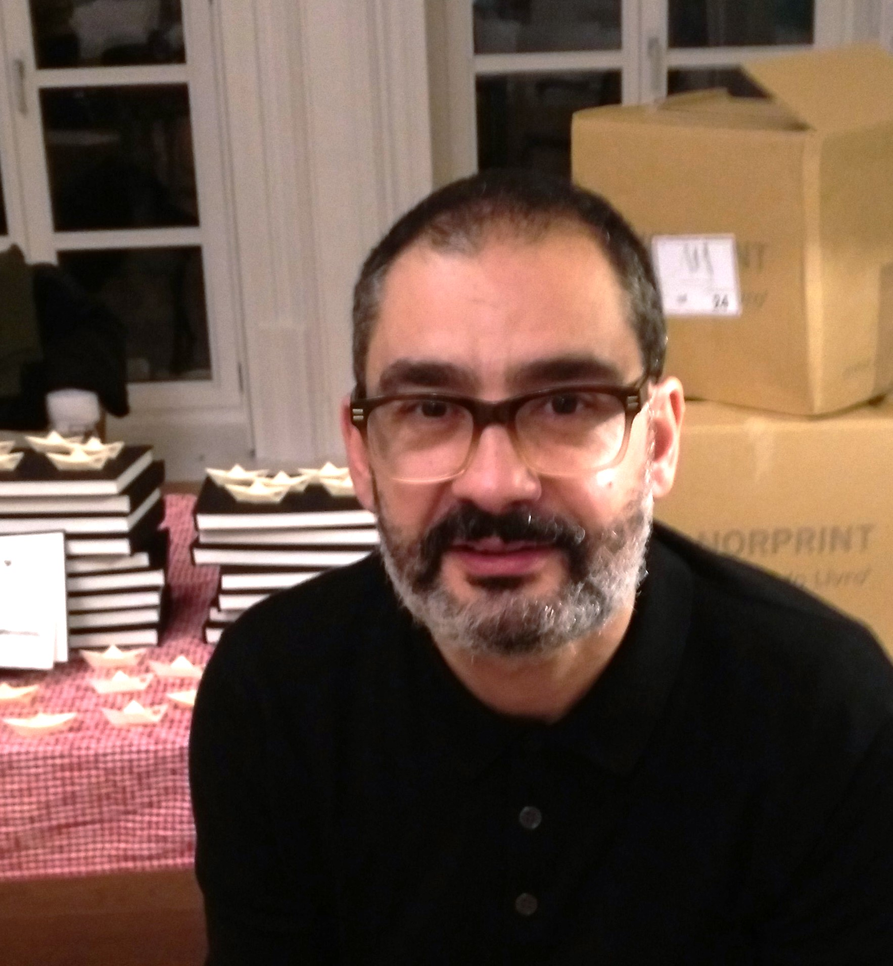 Ricardo de Barreiro, actor, pintor e escritor galego en Pontevedra na presentación de "A+A"